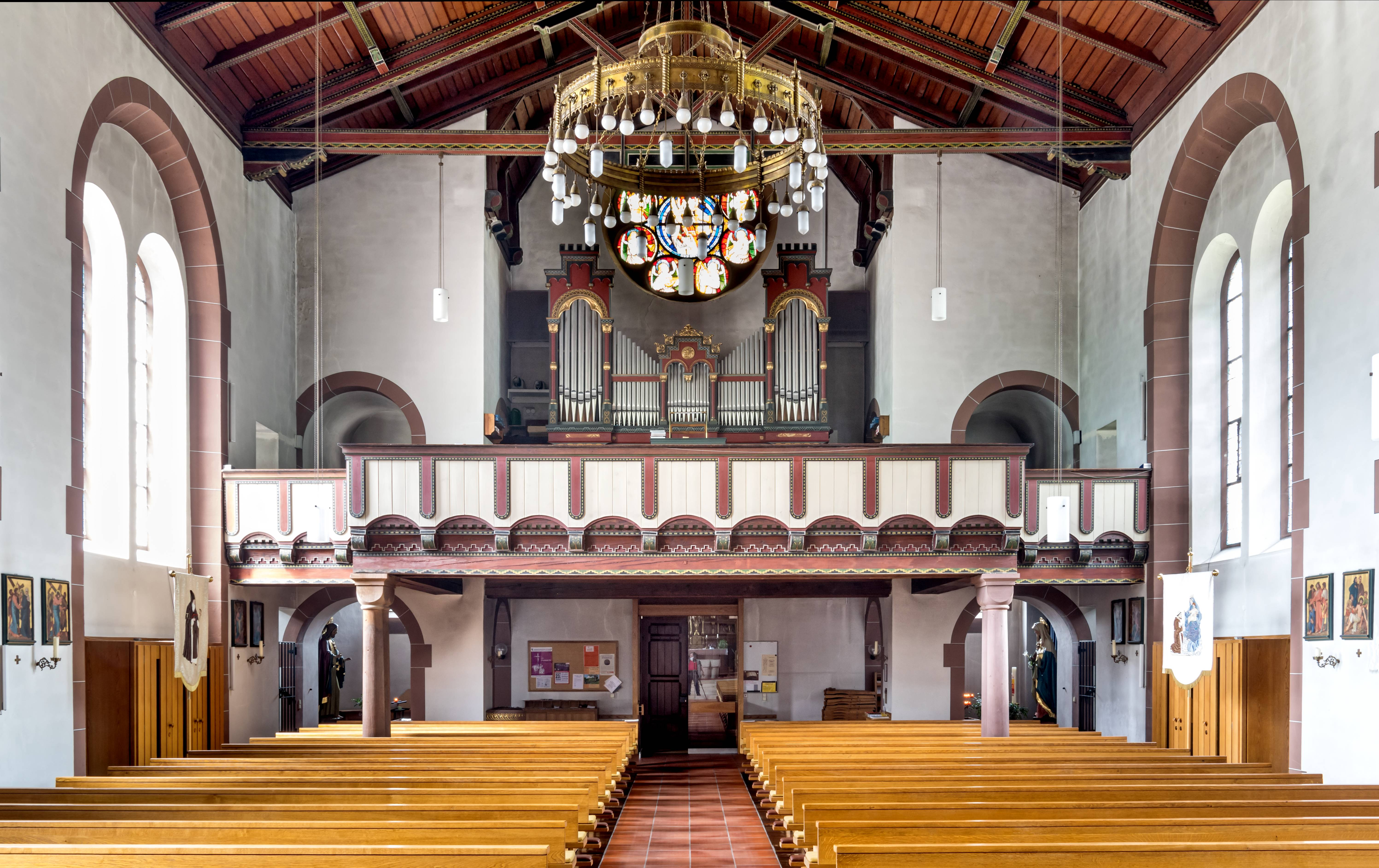 Bilder von der Kirche St Antonius in Schuttertal Blick zum Haupteingang